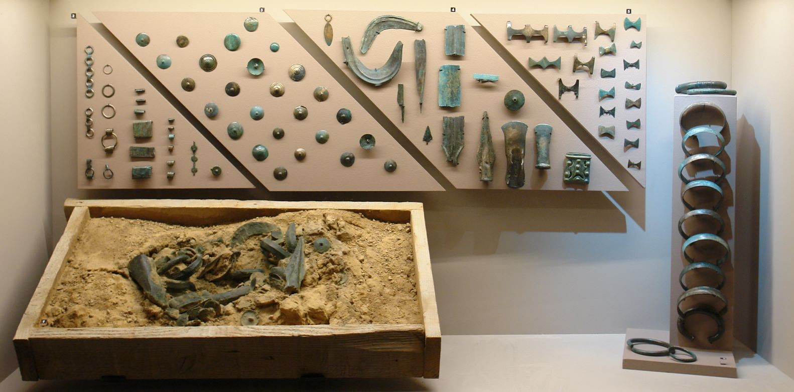 Moulage de grand depot realise au moment de la decouverte (Resine), Age du Bronze final, 1050-950 avan J-C (2001) Foille preventive de la ZAC de Feuilly, Saint-Priest (Rhone), Depot d'objects en bronze - Musée gallo-romain de Fourvière